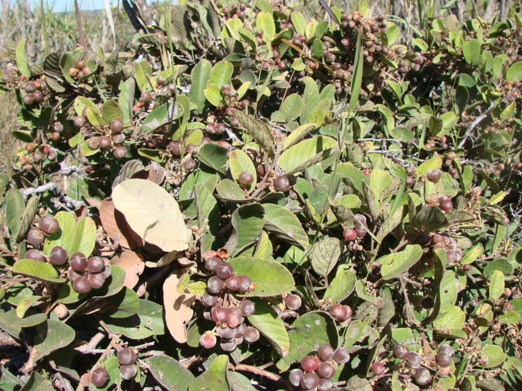 Davilla elliptica, Dilleniaceae - Brasilien/Brasil: Distrito Federal, Jardim Botanico de Brasília